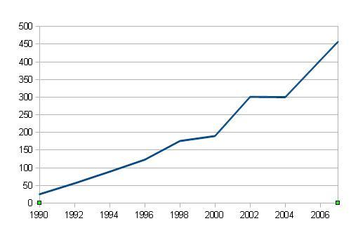 Gráfica con la evolución de la población extranjera en Betxí